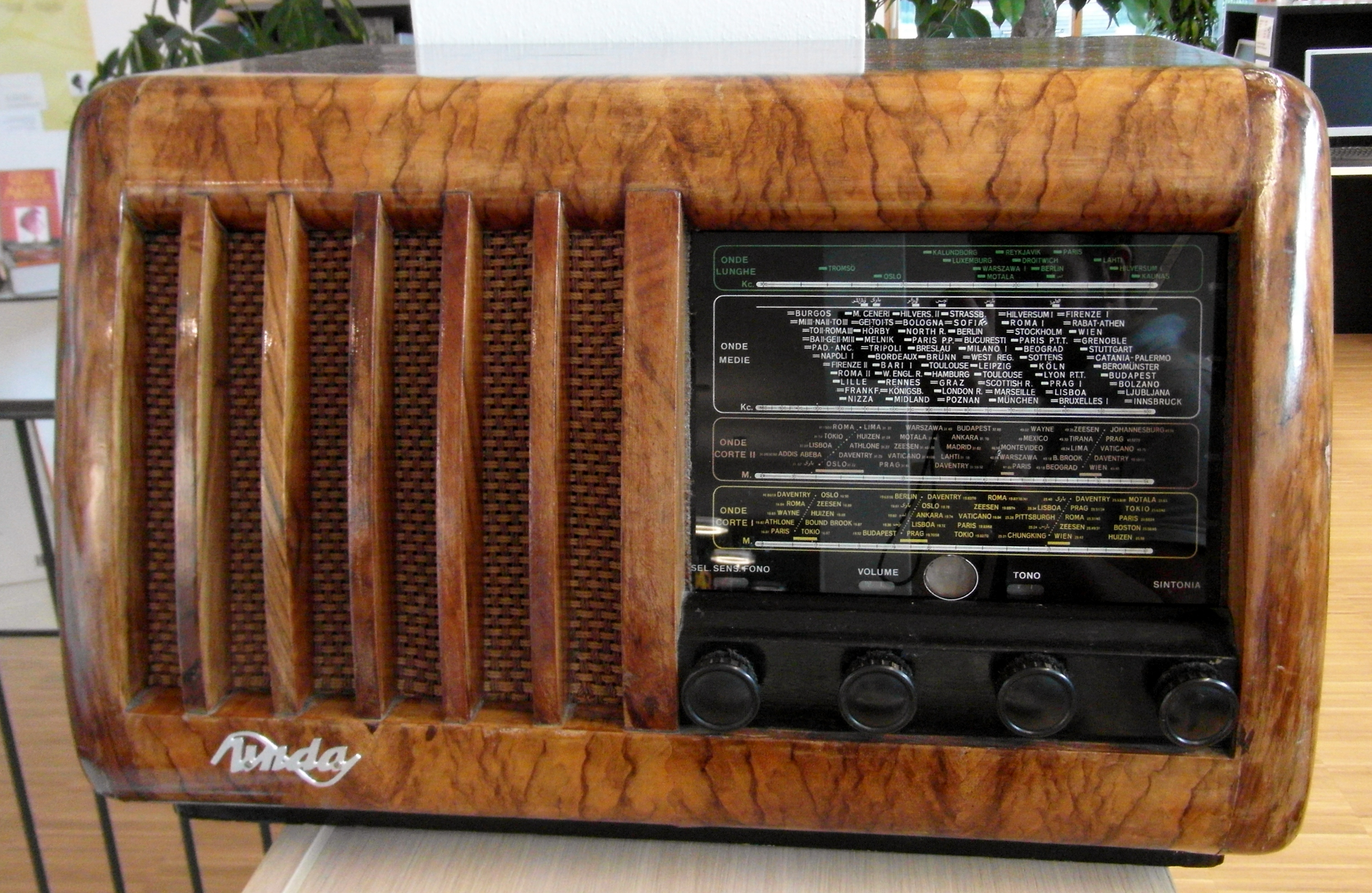 Quadri Unda Radio 545 del 1940 presso biblioteca di Dobbiaco. Modello a circuito supereterodina a 5 valvole.